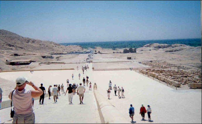 Explanada d'acces al Temple de Hatshepsut, imatge propia